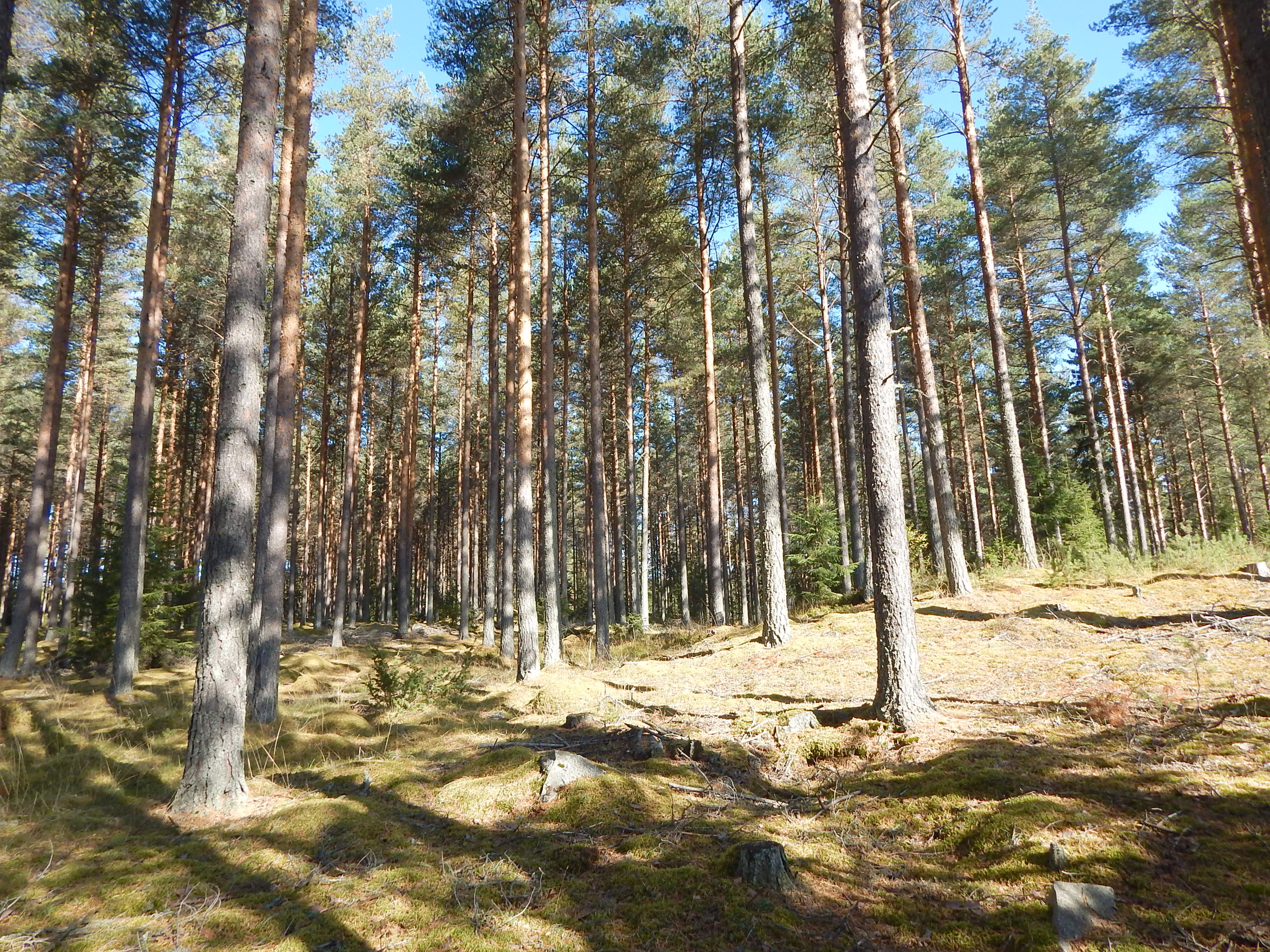 Mosjømarka like nord for Rokosjøvegen